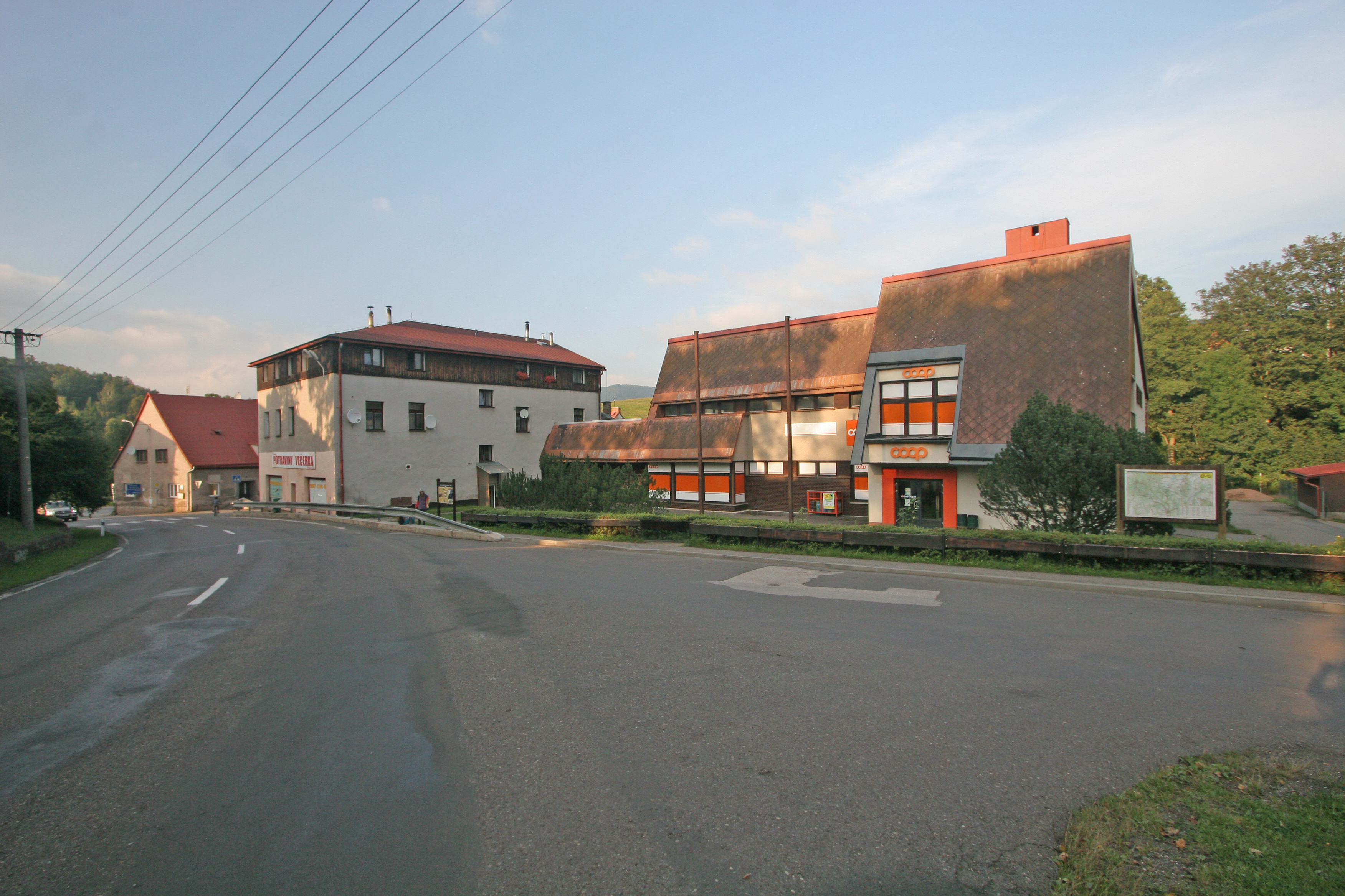 Bernartice prodejna ?